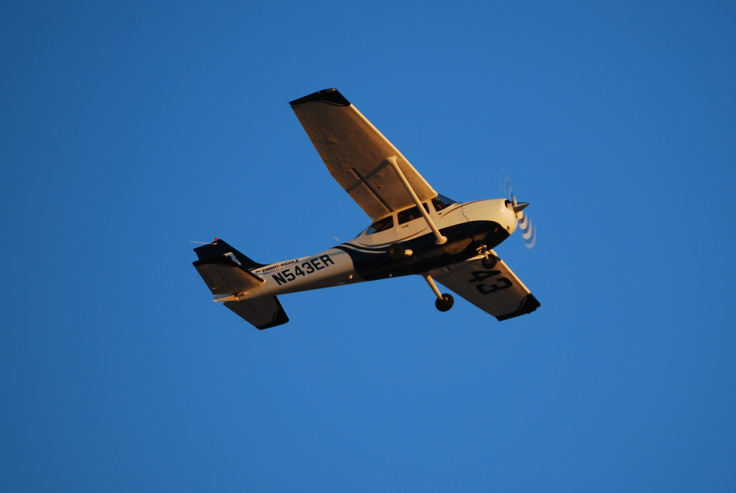 N543ER